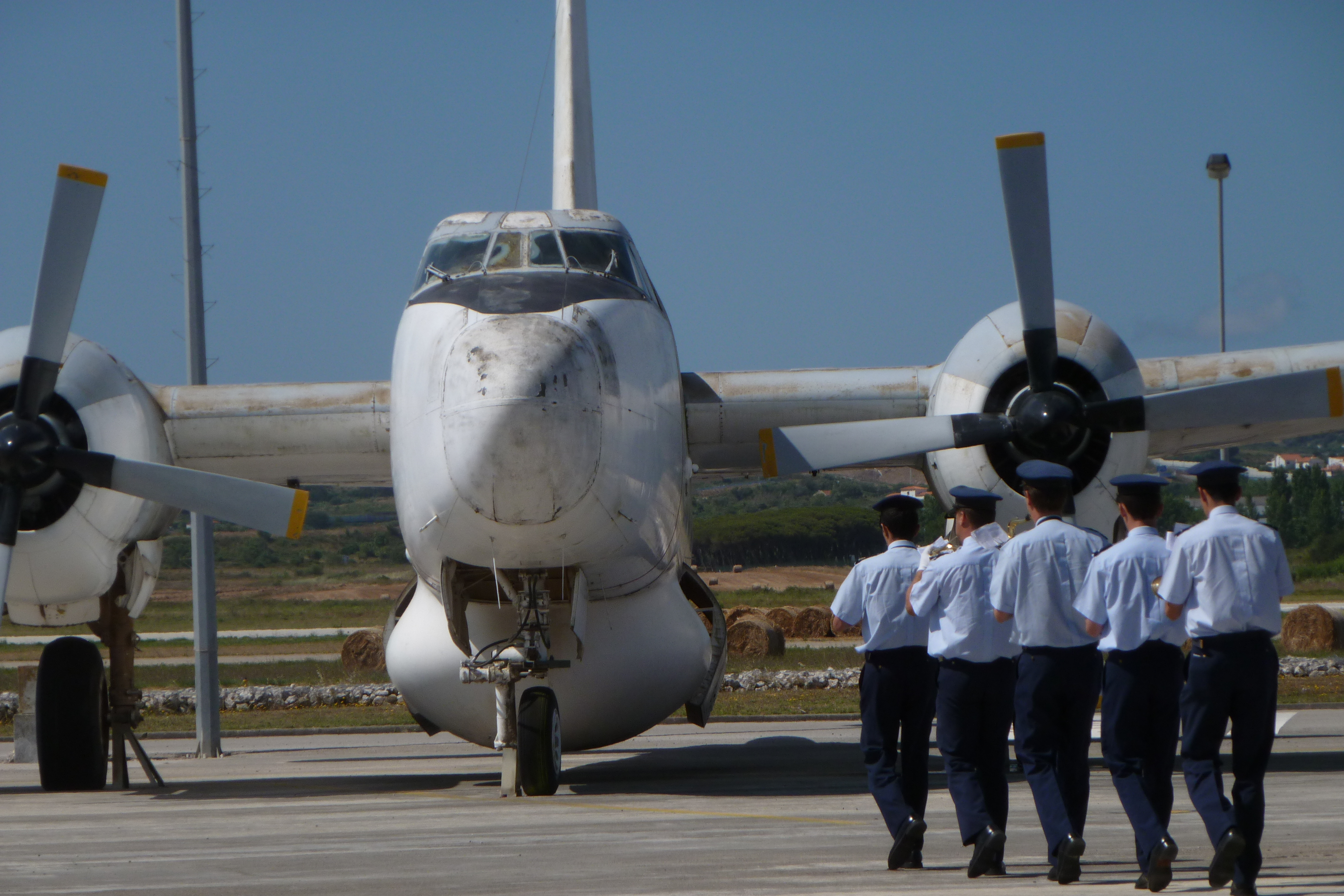 Reabertura do Museu do Ar